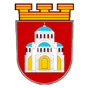 герб Плевенской области